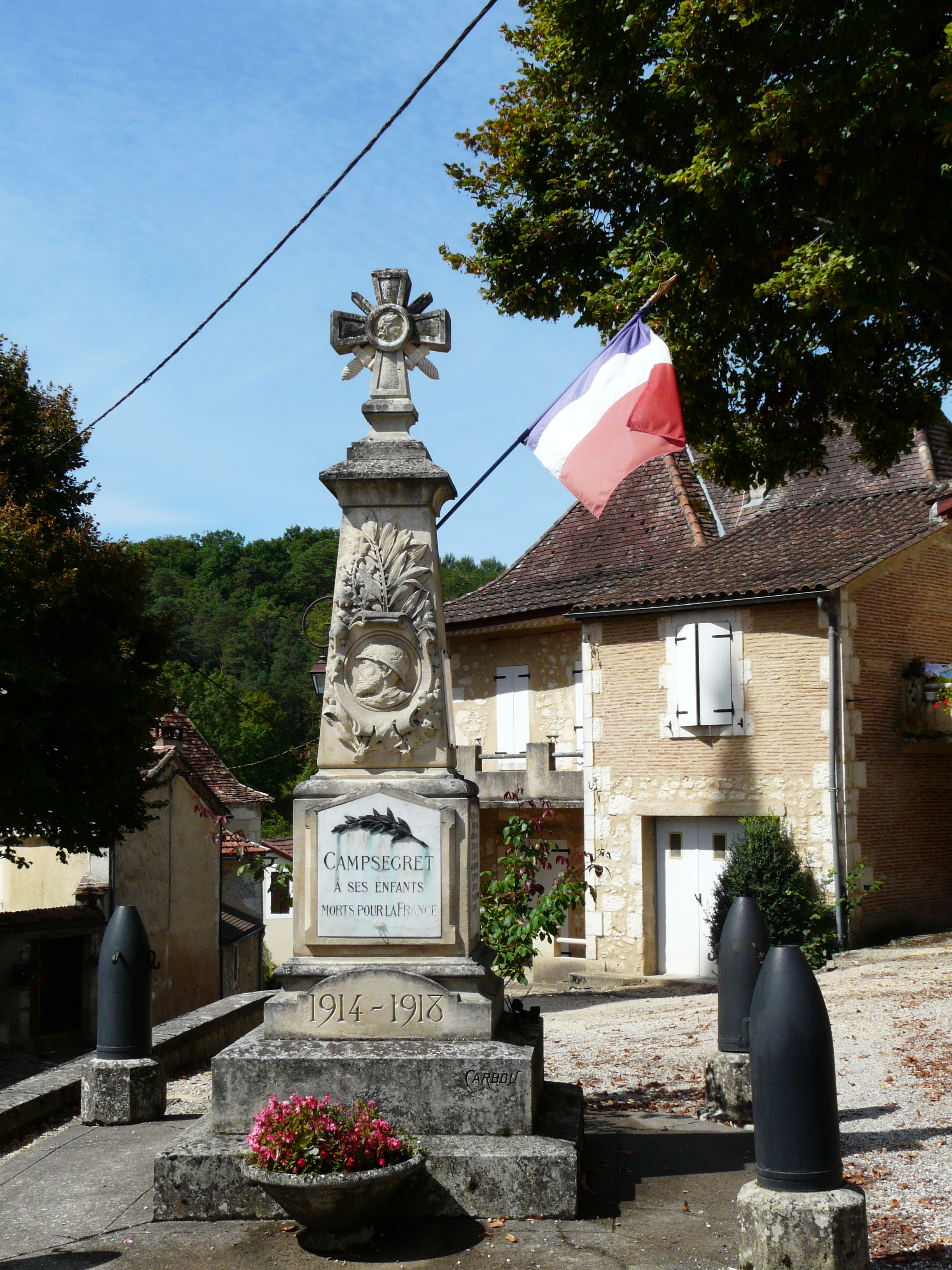 Le monument aux morts de Campsegret, Dordogne, France.